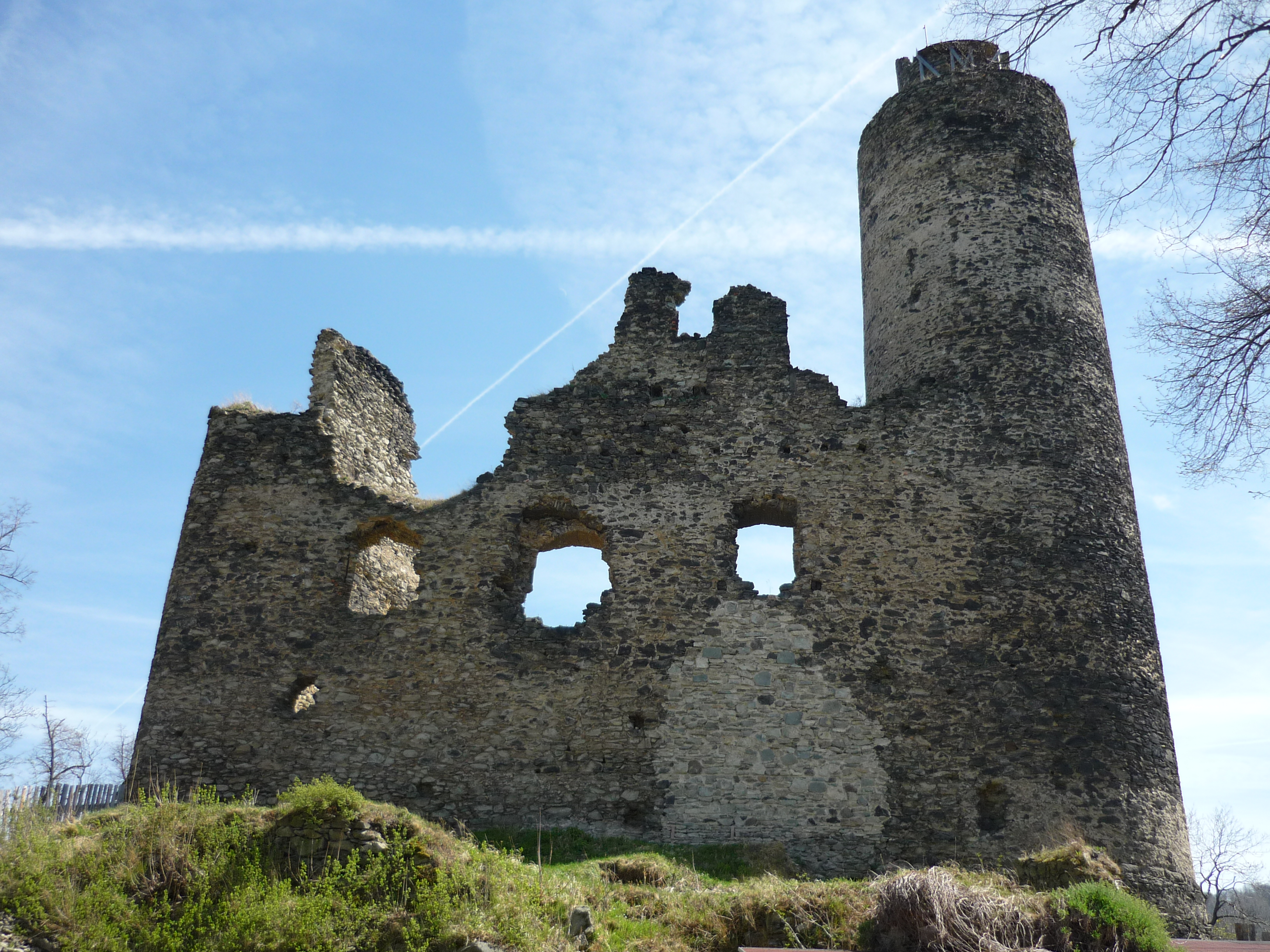 Hrad Kostomlaty pod Milesovkou